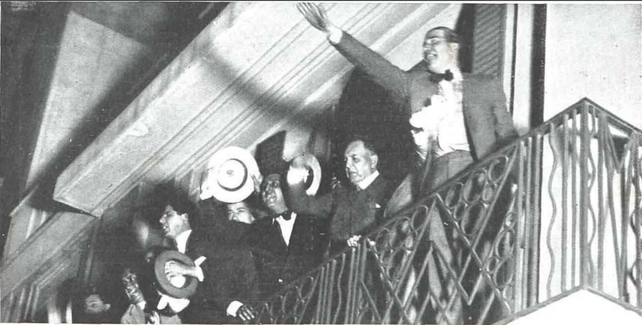 El ex Presidente Hipólito Yrigoyen saluda a una multitud desde la ventana de su casa, al regresar a Buenos Aires luego de su encarcelamiento en la isla Martín García.